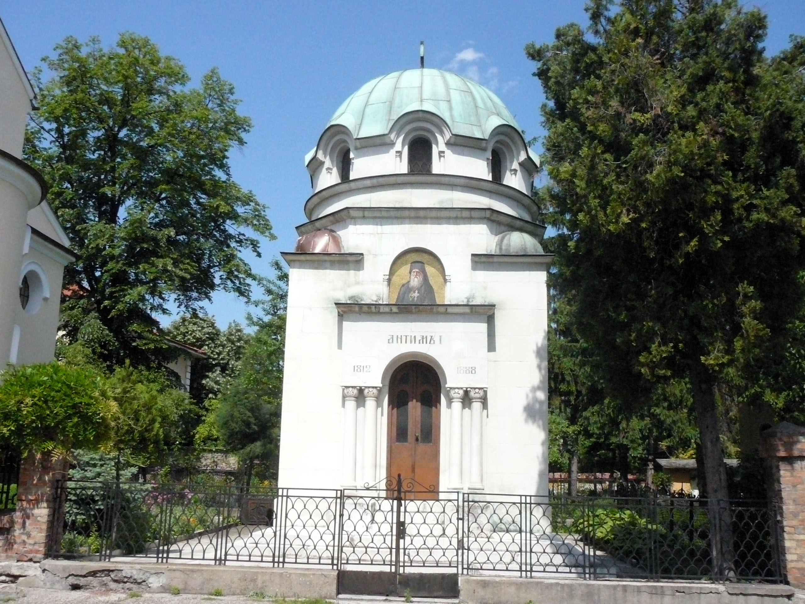 Vidin,Bulgaria; Мавзолей на екзарх Антим I